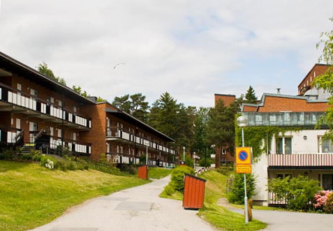 En bild på Blomsterfondens seniorboende i Liseberg, Älvsjö.